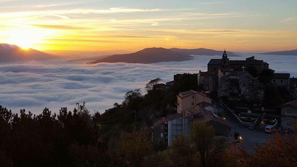 Guardiabrunapanorama